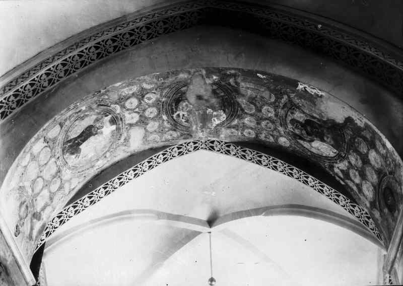 Kalkmålningar i triumfbågen. Kategori: (03) KalkmålningarKalkmålningar i triumfbågen.